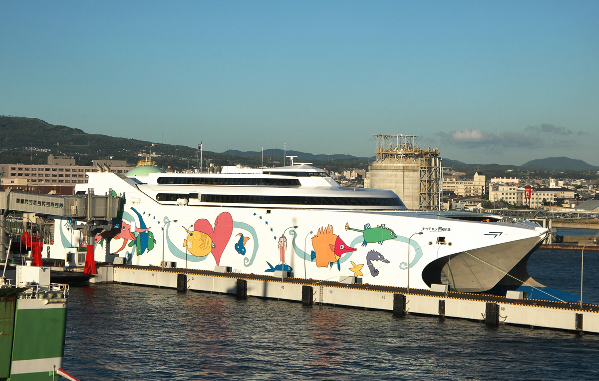 2007年8月23日17:40、函館フェリーターミナル出港直後の青森行きフェリー上にて撮影。 Category:船舶画像